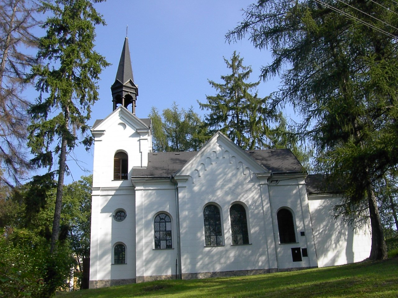 Virgin Maria Church Konstantinovy Lázně, Czech Republic. Kostel Panny Marie Lourdské v Konstantinových Lázních